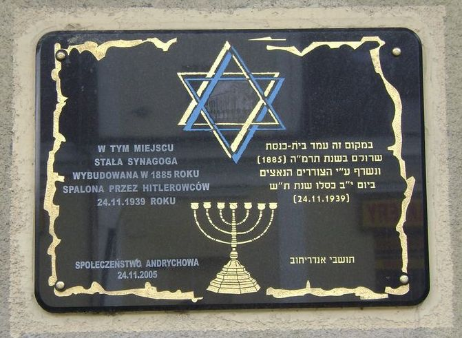 Tablica pamiątkowa upamiętniająca synagogę w Andrychowie